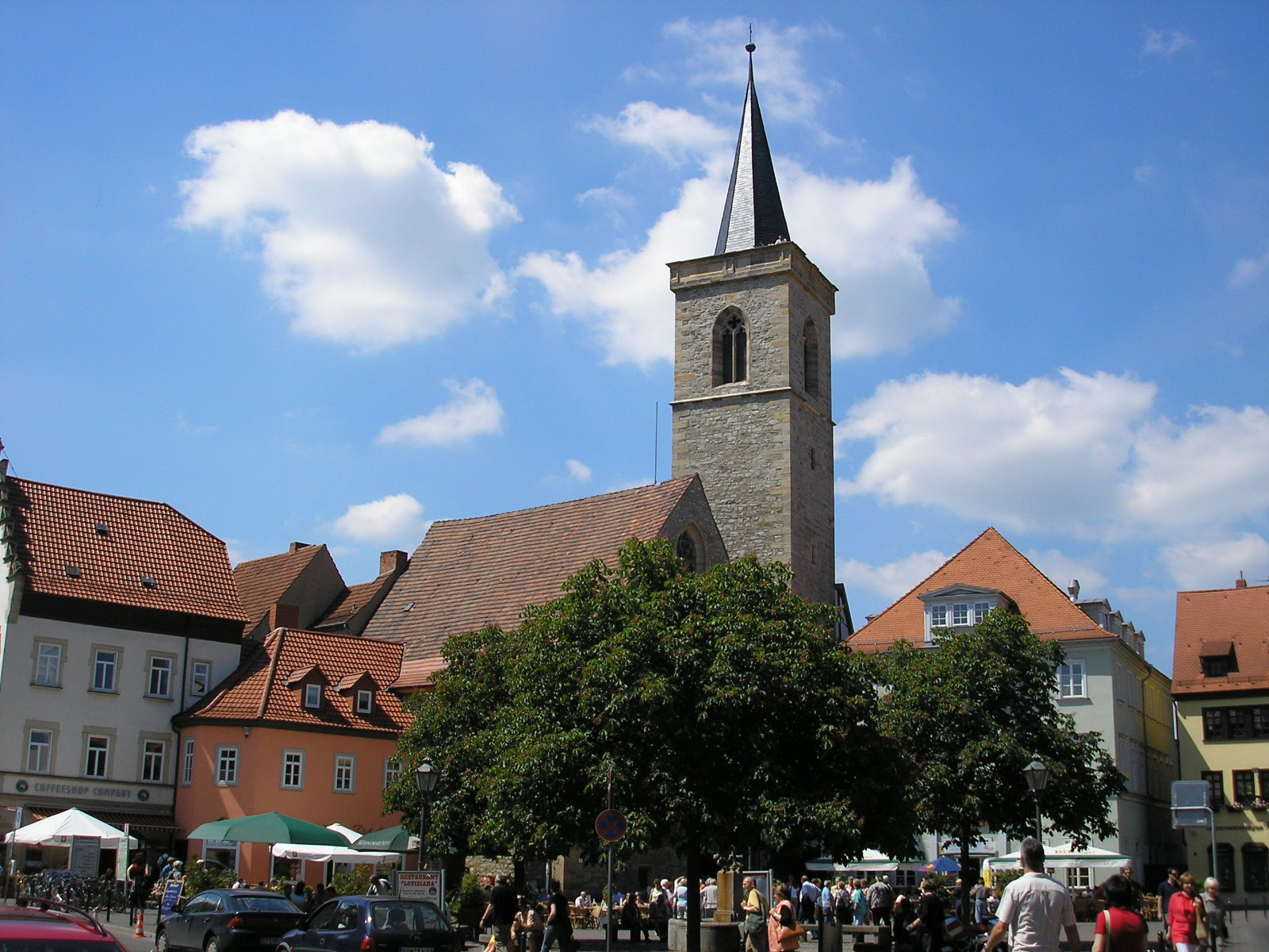 Roter Turm und Wenigemarkt in Erfurt